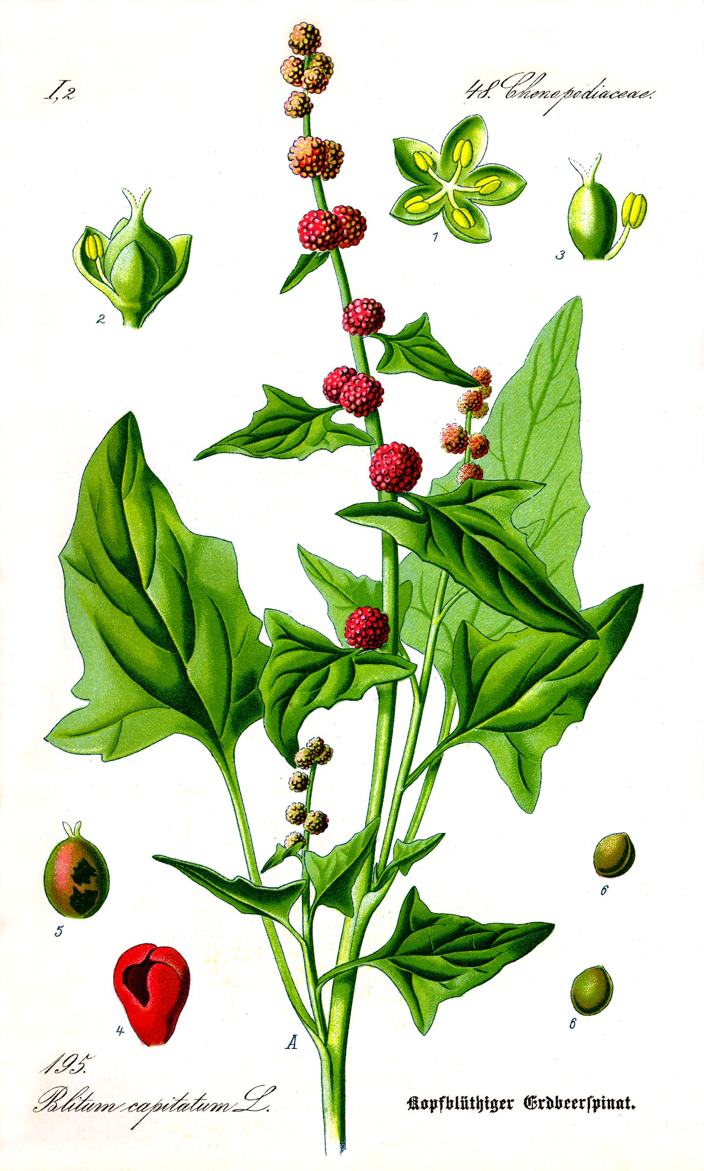 Name Chenopodium capitatum (= Blitum capitatum) ;Family:Amaranthaceae Original book source: Prof. Dr. Otto Wilhelm Thomé Flora von Deutschland, Österreich und der Schweiz 1885, Gera, Germany Permission granted to use under GFDL by Kurt Stueber